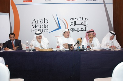 Saudi_Session أعلاميون سعوديون